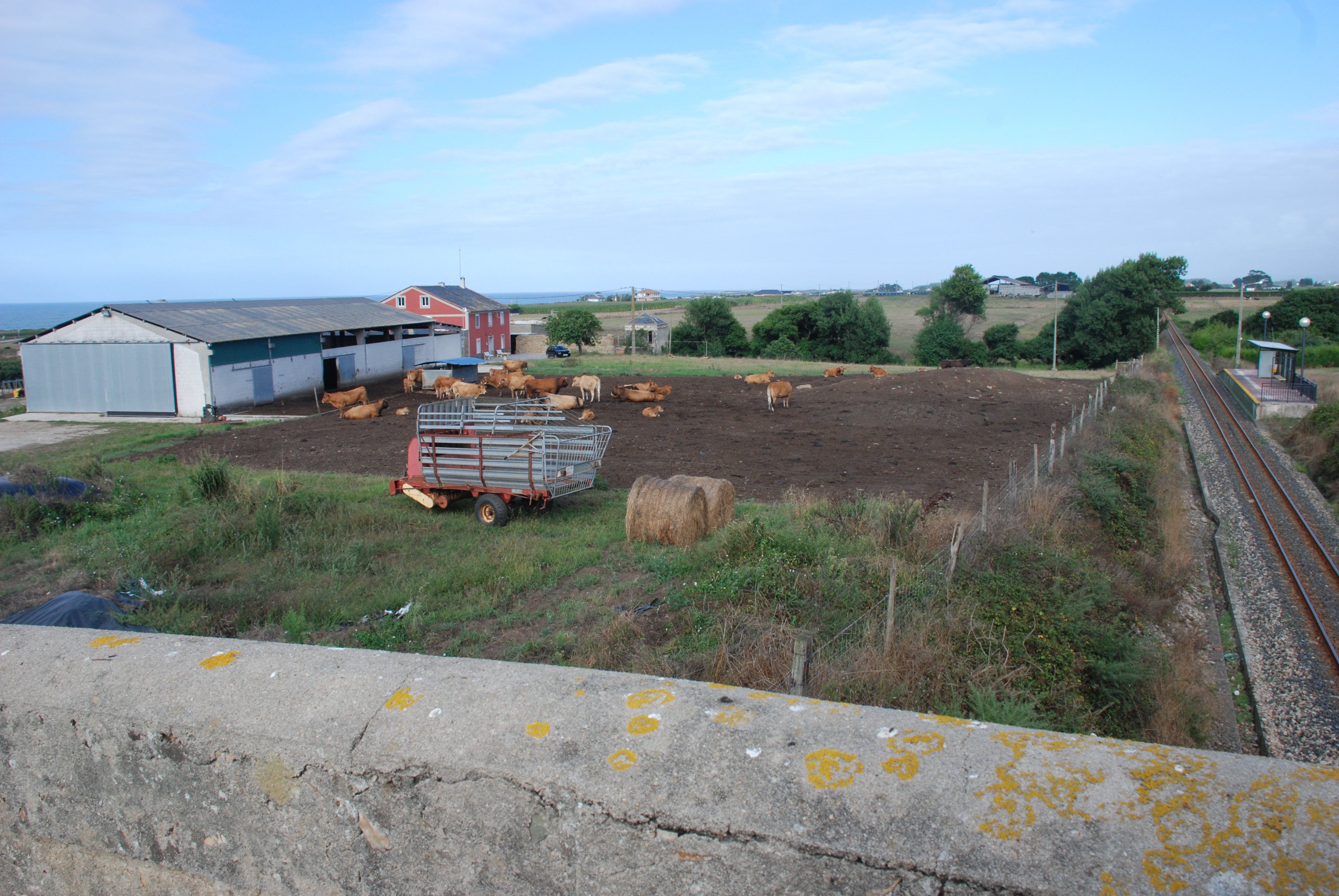 Esteiro, przystanek kolei Feve